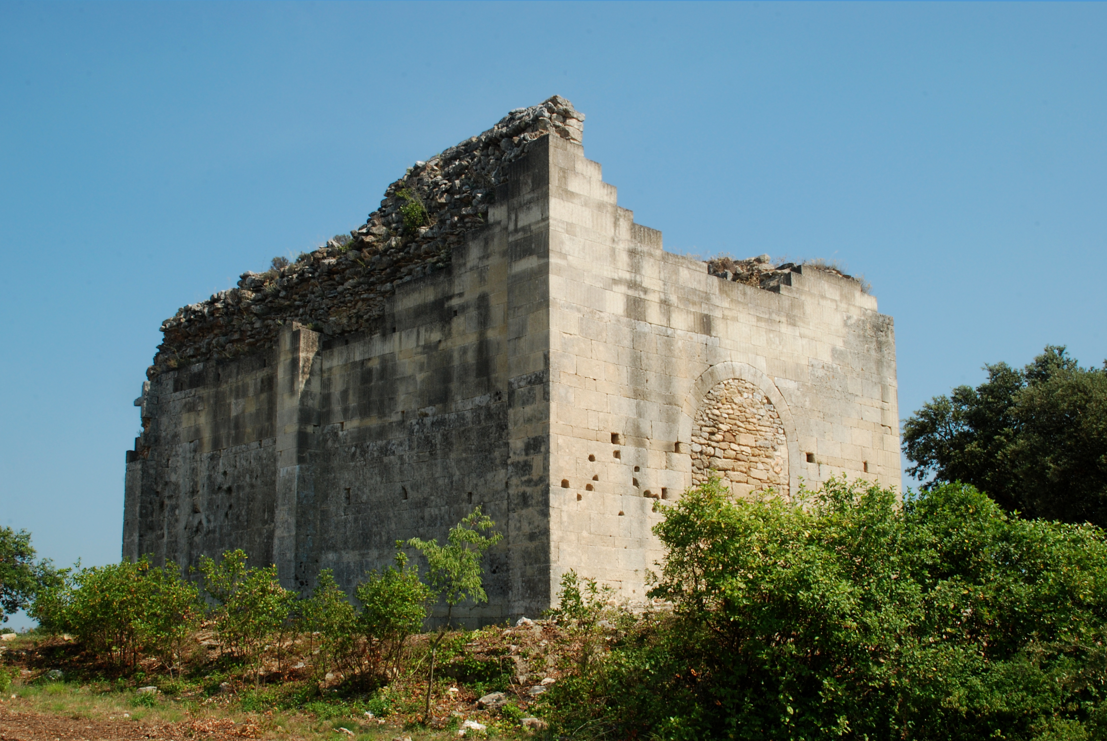 France - Gard - Église Saint-André de Souvignargues